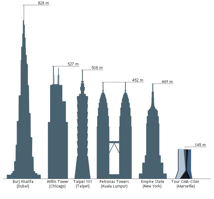 Comparaison des hauteurs de certains buildings avec la Tour CMA-CGM à Marseille.